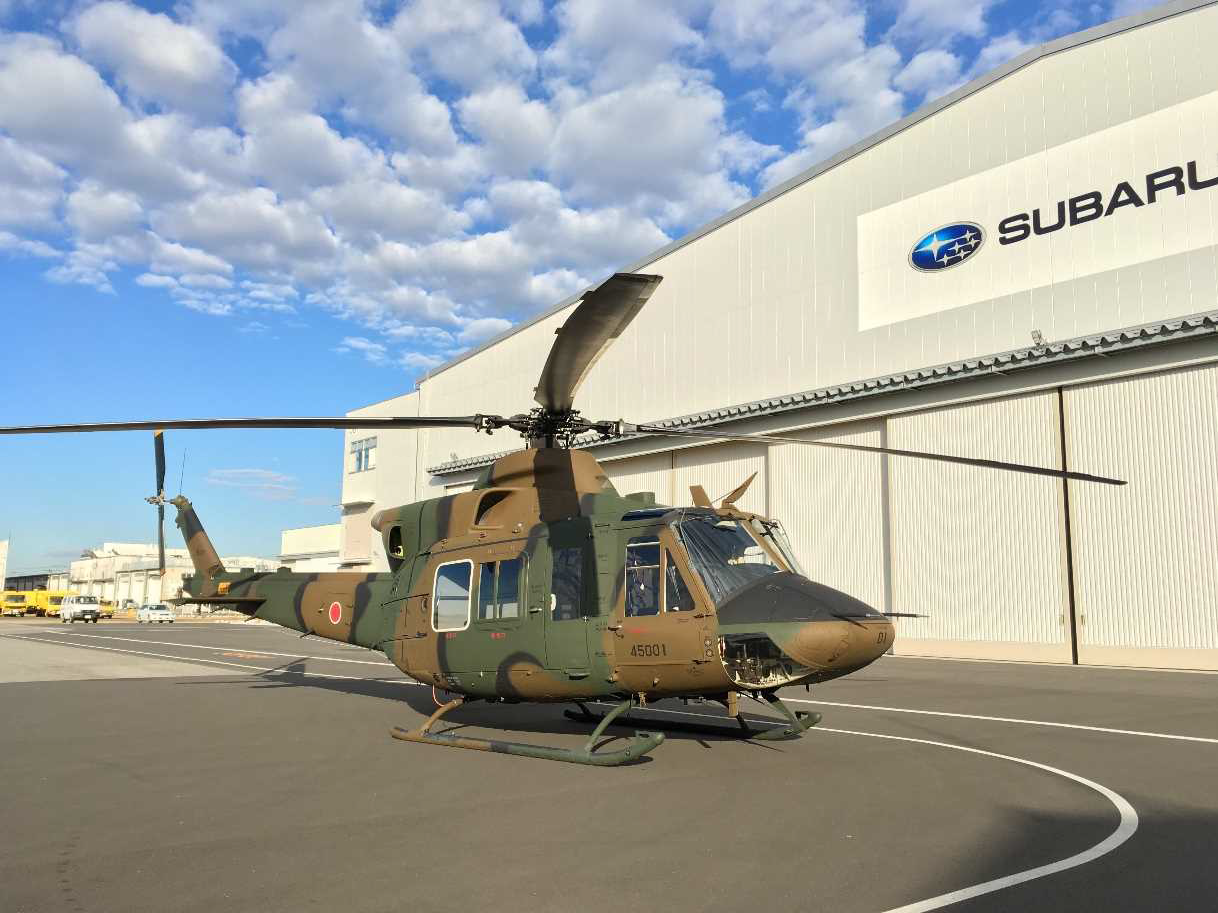 陸上自衛隊新多用途ヘリコプターの試作機。飛行試験に必要な確認作業が終了した由のプレスリリースからの引用。